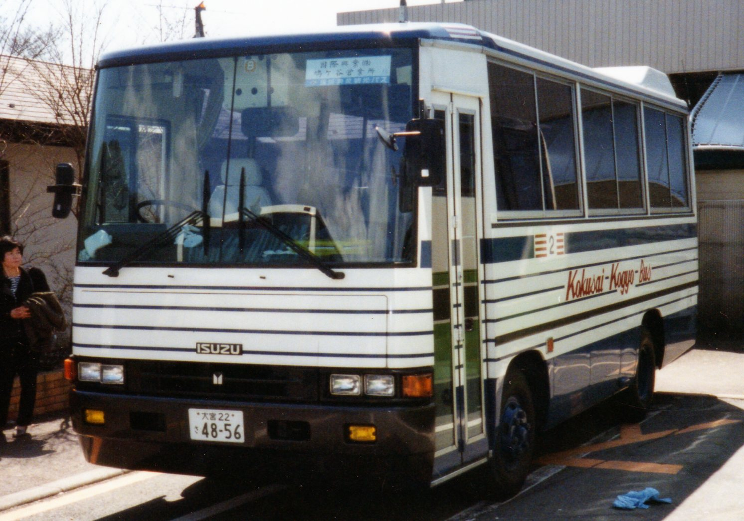 Kokusai Kogyo 2 Isuzu P-MR112D at Motohakone